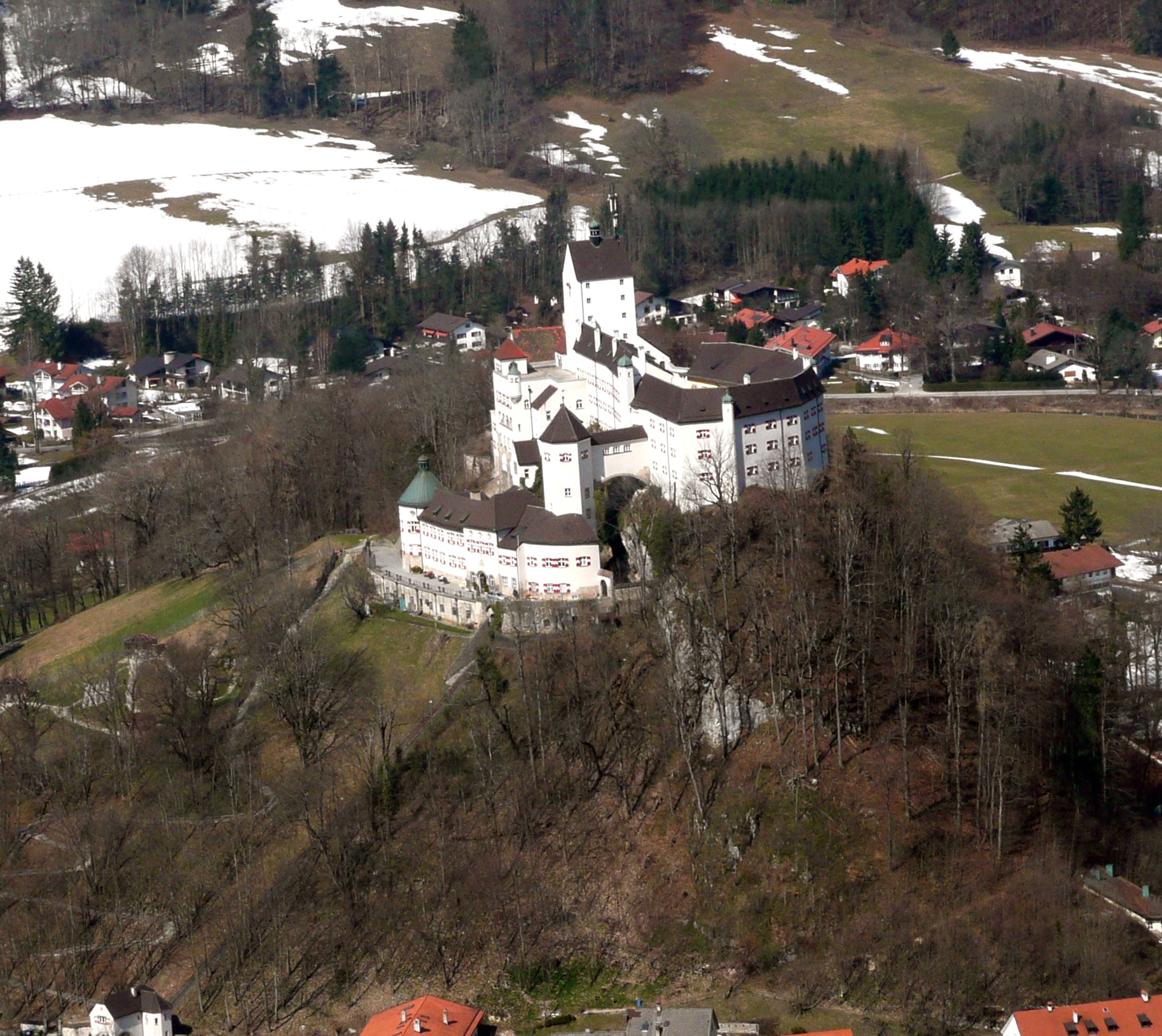 Das Schloss Hohenaschau aus einer Gondel der Kampenwand Seilbahn etwa aus östlicher Richtung aufgenommen. Die Bildqualität wurde nachbearbeitet.